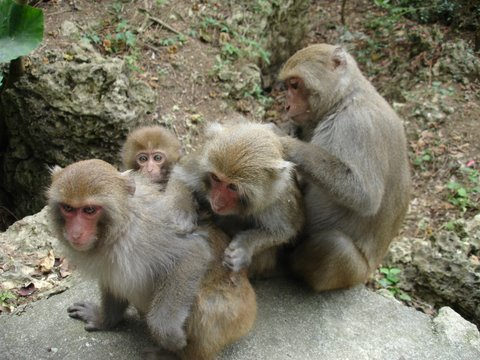 Femelle Macaca cyclopis toilettant un jeune. Photographie de Minna J. Hsu avec son aimable autorisation.